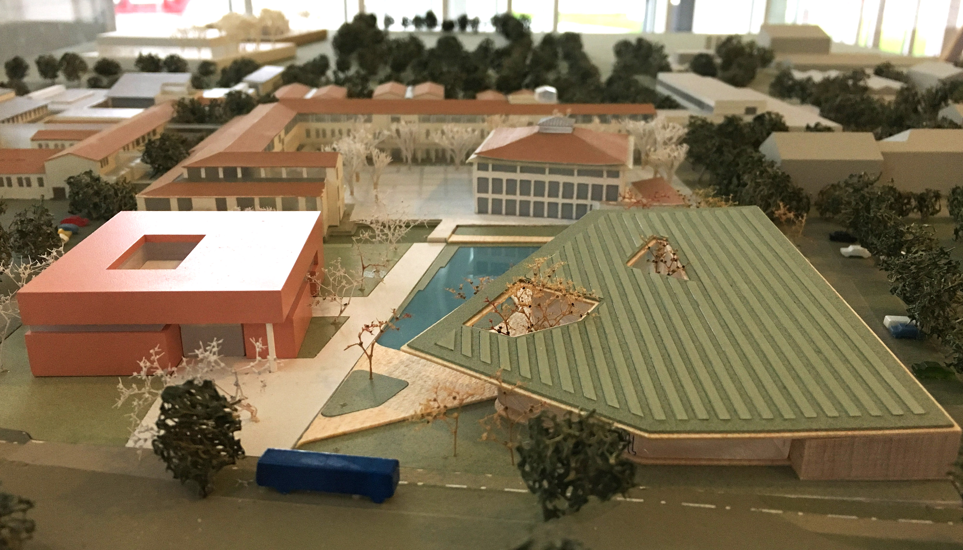 Mit dem Bau der neuen Mensa - auf dem Bild mit grünem Dach - soll Anfang 2019 begonnen werden.